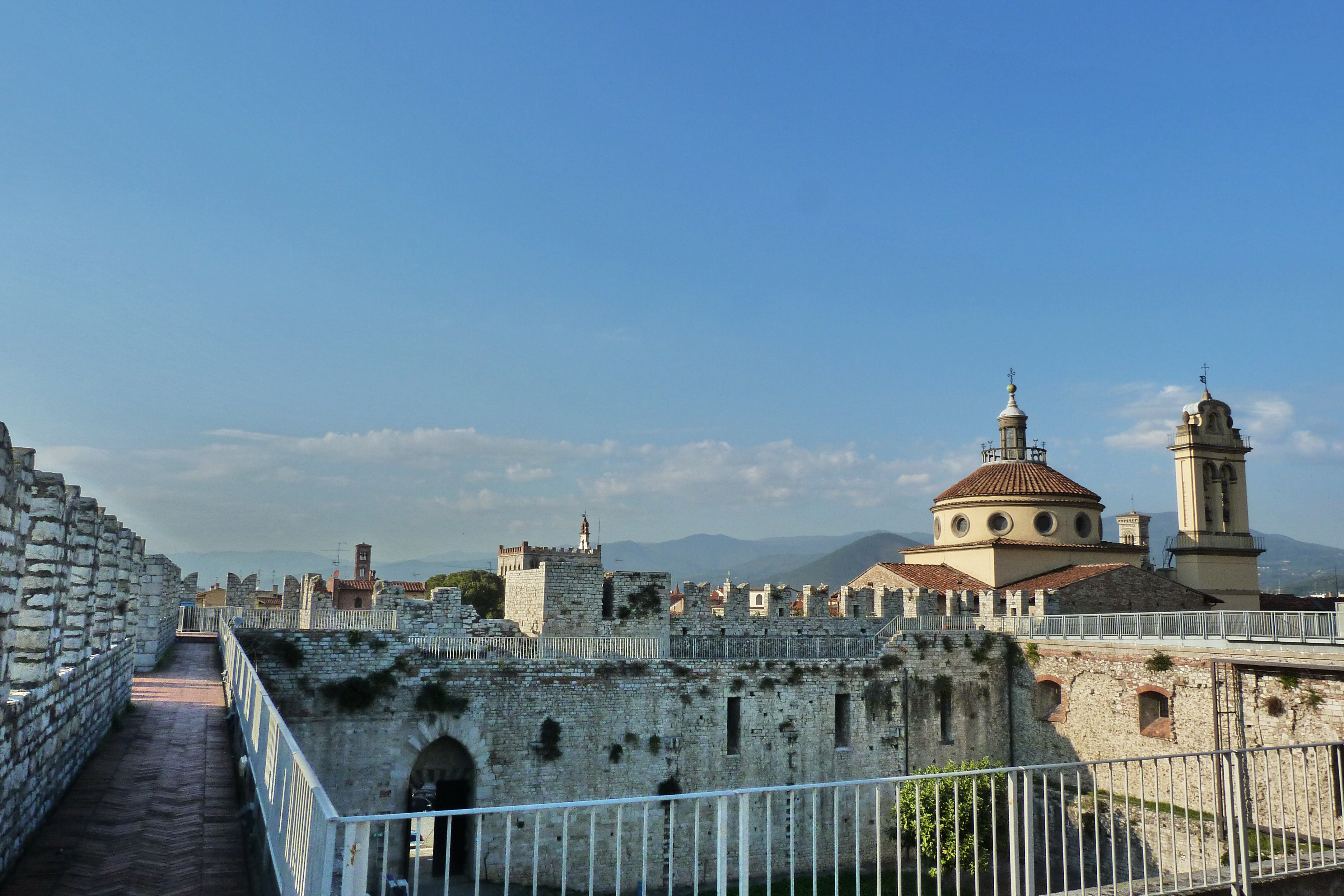 Interno del castello dell'Imperatore con vista di Santa Maria delle Carceri e Palazzo Pretorio, Prato, Toscana, Italia This is a photo of a monument which is part of cultural heritage of Italy.